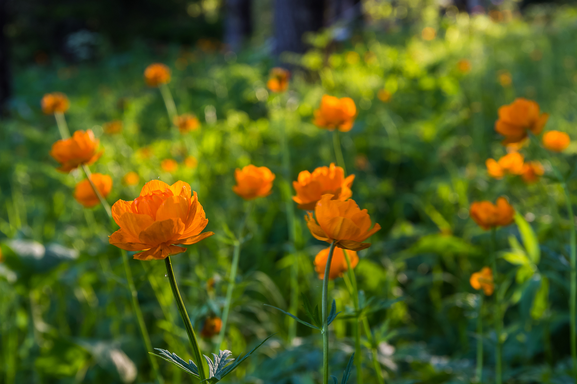 Алтайский заповедник: Алтайский заповедник расположен в центре Алтае-Саянской горной страны, Турочакский район, Алтай This image is related to the protected area of Russia number 0400028